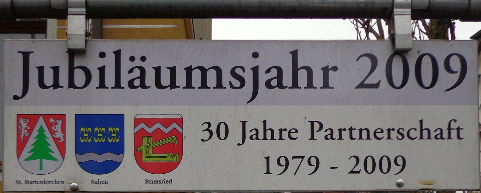 Erinnerungstafel zur Gemeindepartnerschaft St Marienkirchen - Suben - Stamsried vor der alten Gemeinde in St Marienkirchen bei Schärding